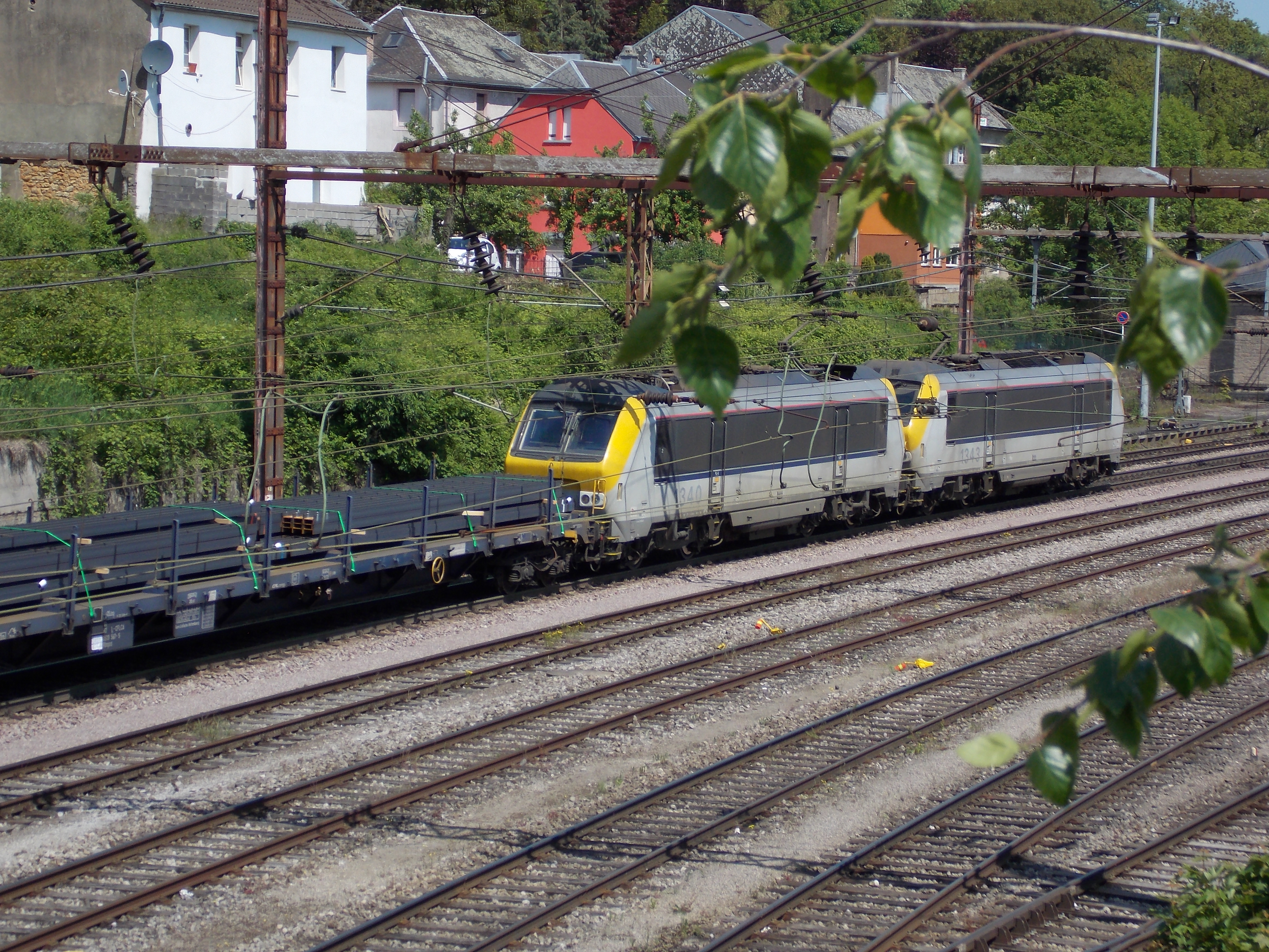 SNCB 3140 und SNCB in Differdingen mit Güterwagen